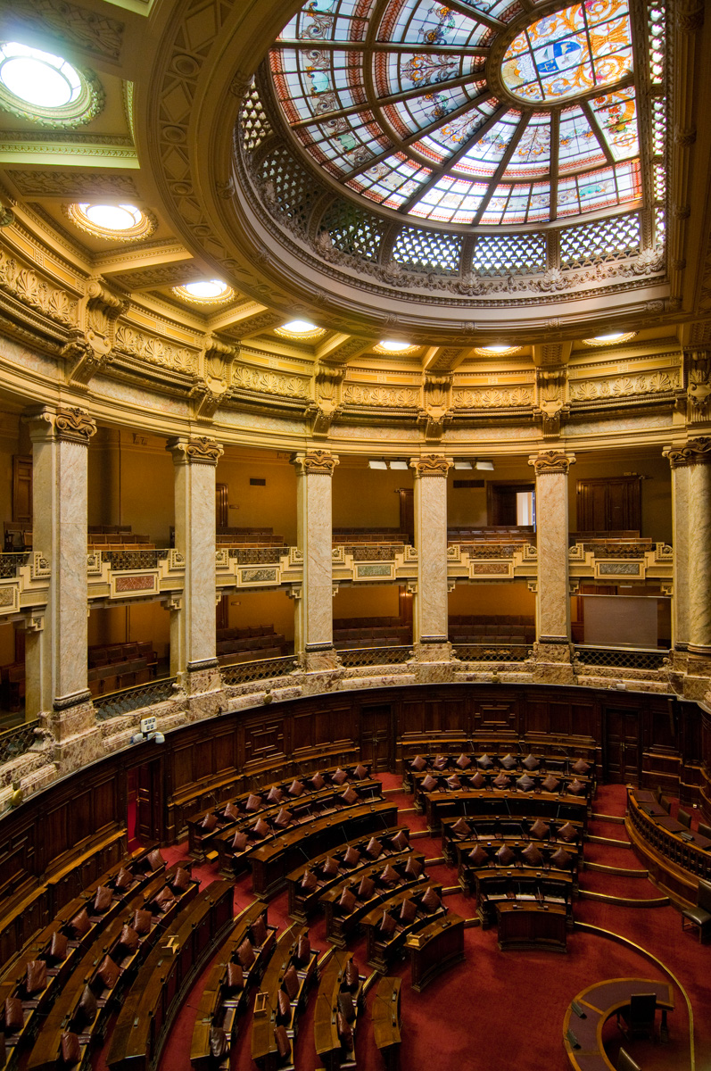 Palacio Legislativo. Ubicada en el departamento de Montevideo